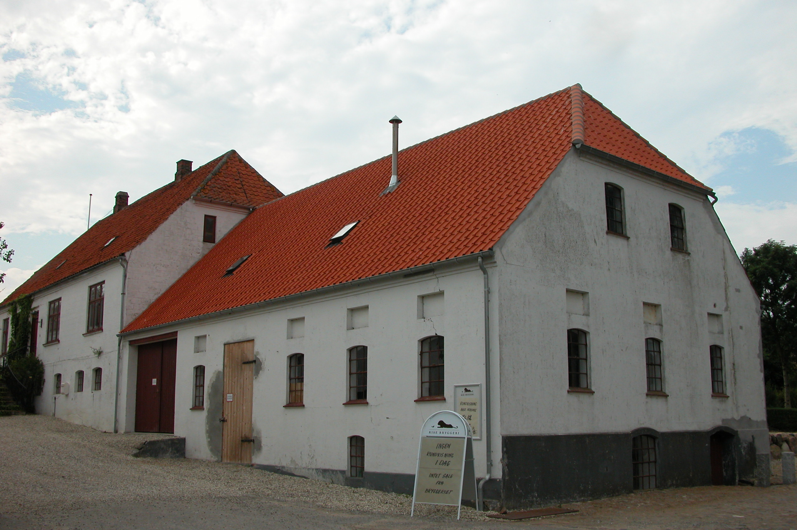 Rise Bryggeri, Ærø, Danmark